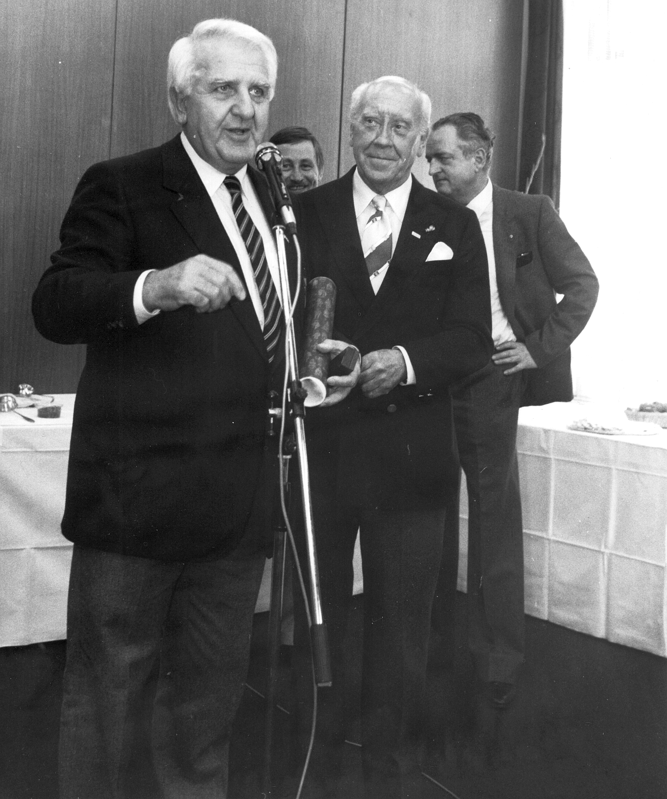 Mitglieder der Pelzbranche auf der Frankfurter Pelzmesse im Jahr 1982. Von links: Walter Langenberger (Deutscher Rauchwarenverband) Christian Franke (Rauchwarenkaufmann und Verleger) (im Hintergrund) Heinz Levié (Fränkische Pelzindustrie Marco, Fürth) Jürgen Thorer (Rauchwarenveredlung und -handel Thorer & Co.)